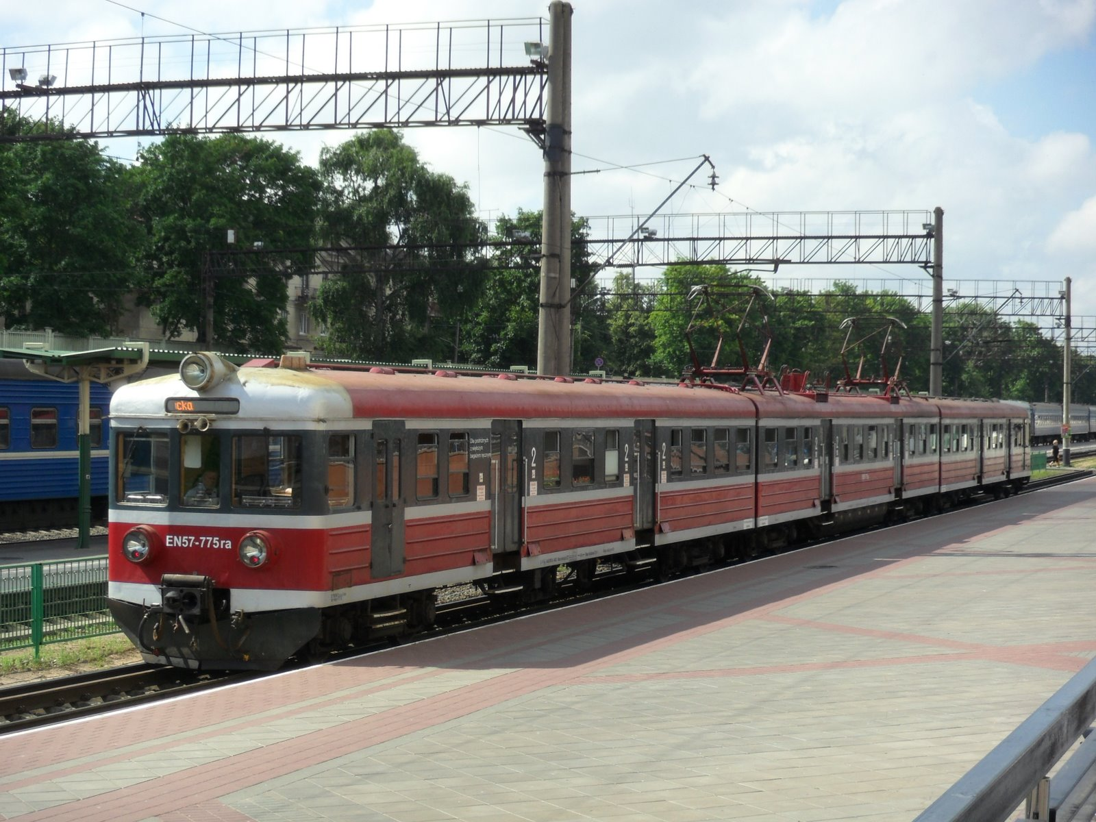 электричка